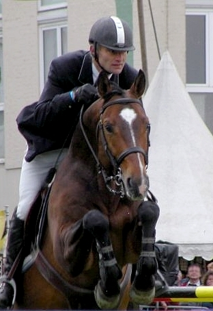 Eric Navet Maubeuge CSI ***